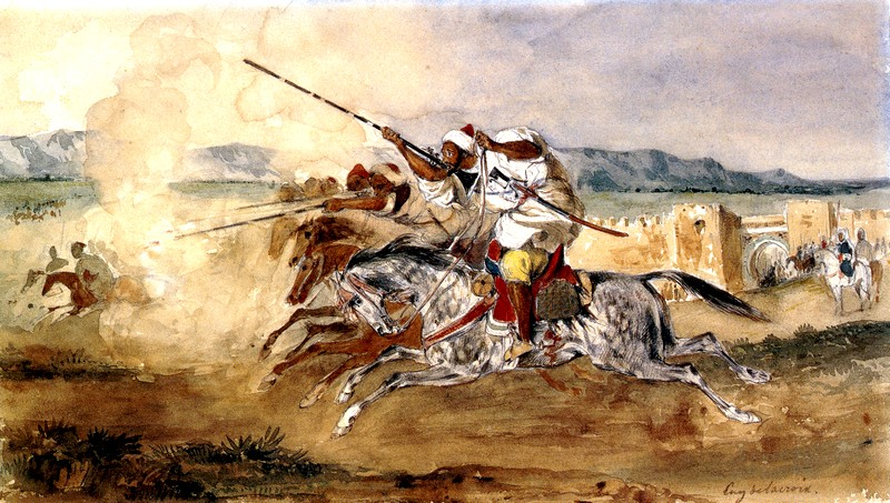 Des cavaliers en ligne, dressés sur leurs selles, s'élancent au galop vers la gauche, tirant des coups de fusils. Au fond, à droite, un caïd à cheval entouré de cavaliers, et, plus loin, la porte de Méquinez. Au fond, des montagnes.